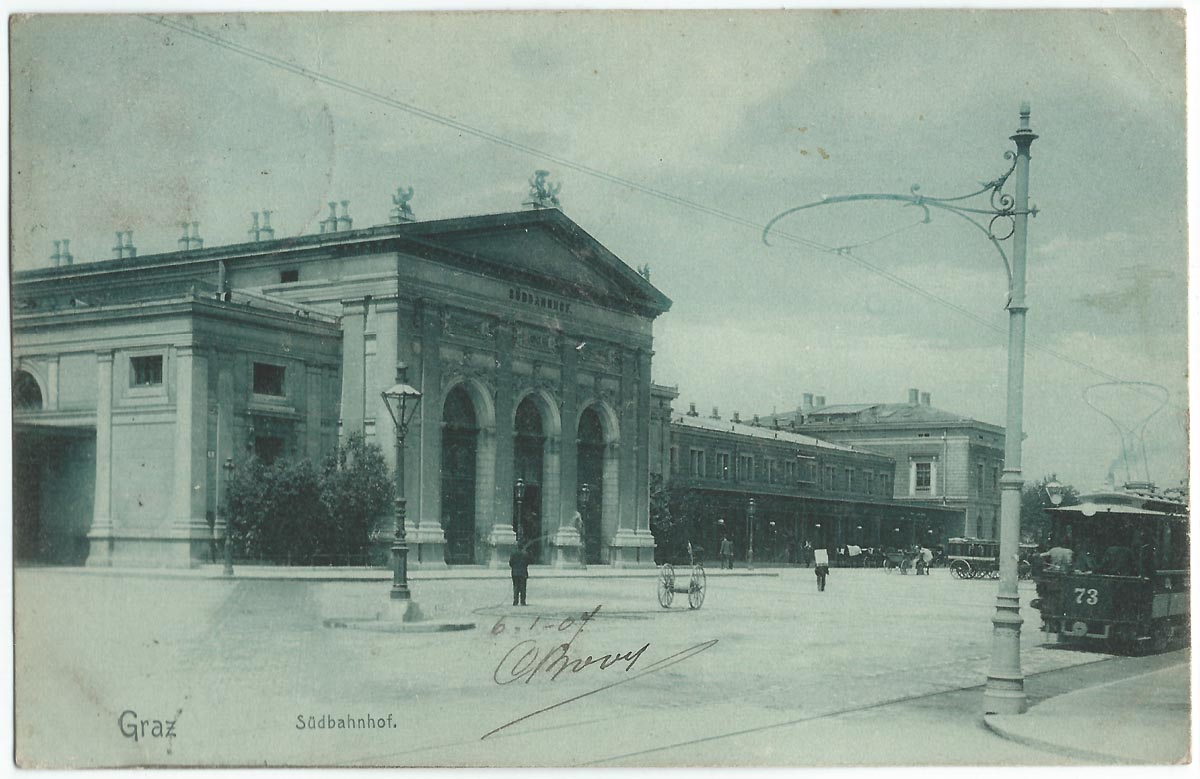 Vue de Graz, au début du XXe siècle.